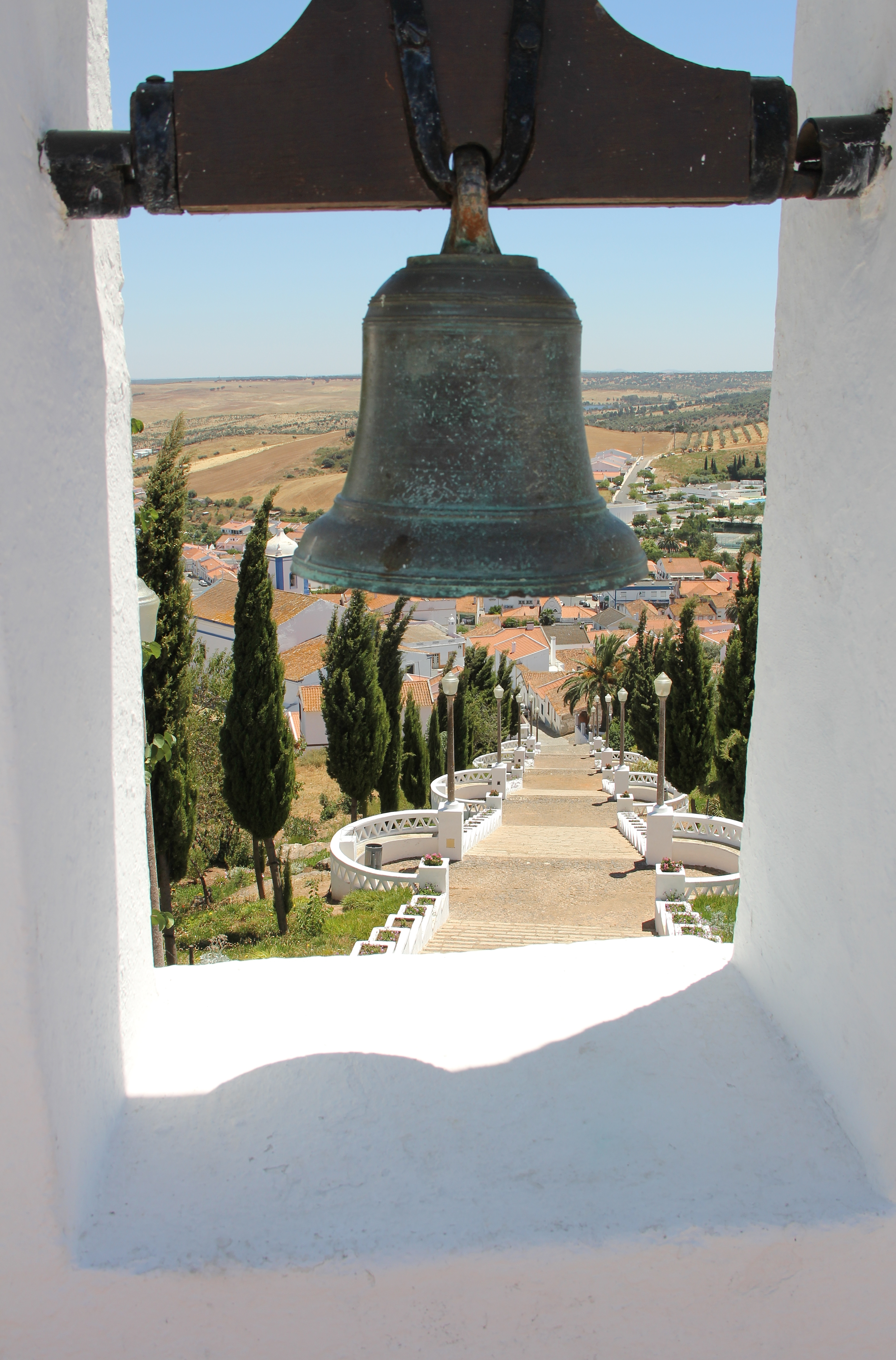 Les escaliers de l'église Notre Dame du Château à Aljustrel, Portugal